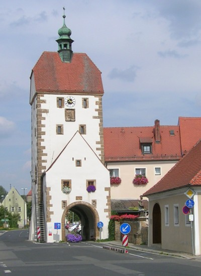 Vogelturm, VilseckThis is a photograph of an architectural monument.